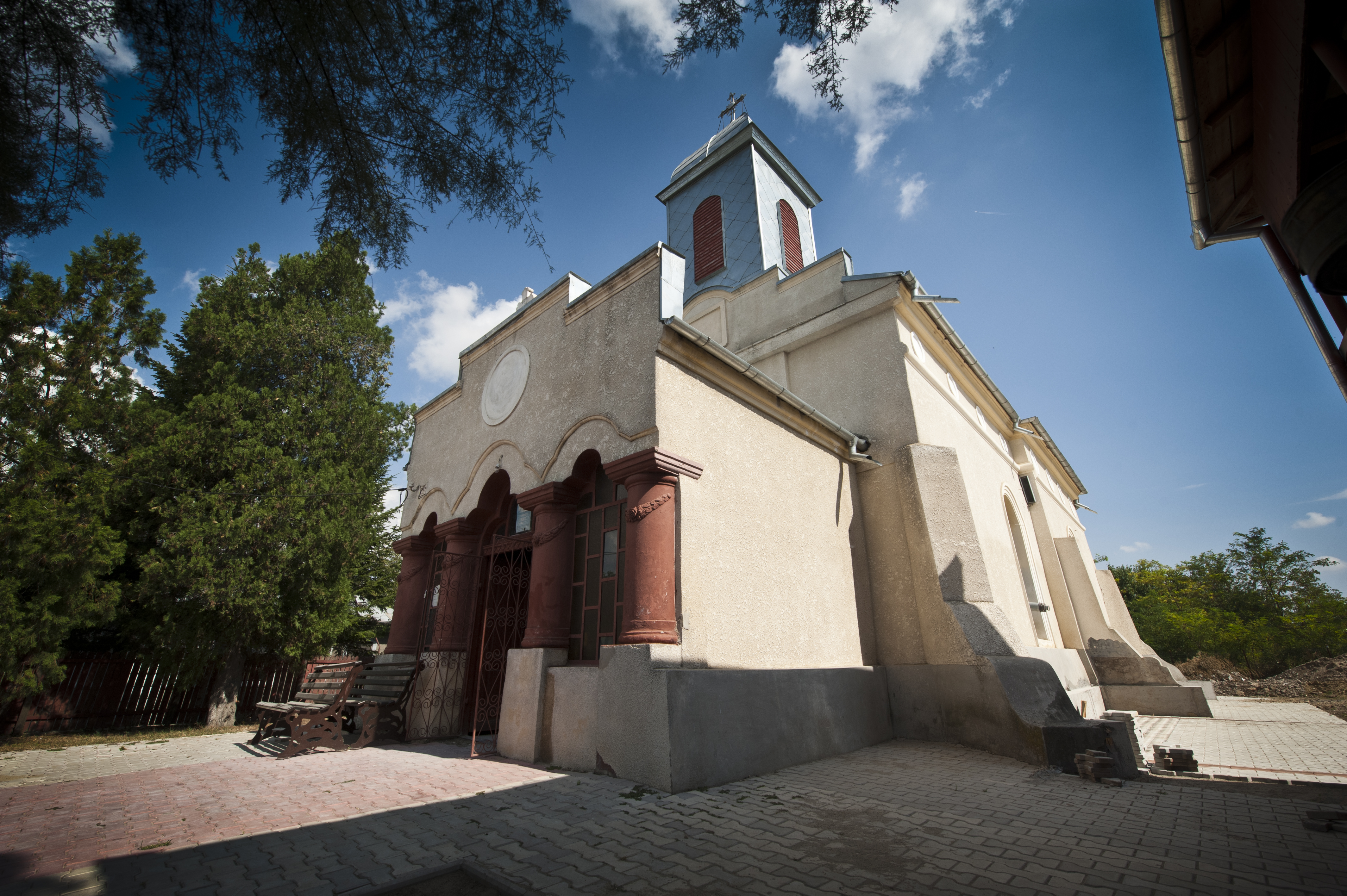 Biserica „Sf. Ierarh Nicolae”